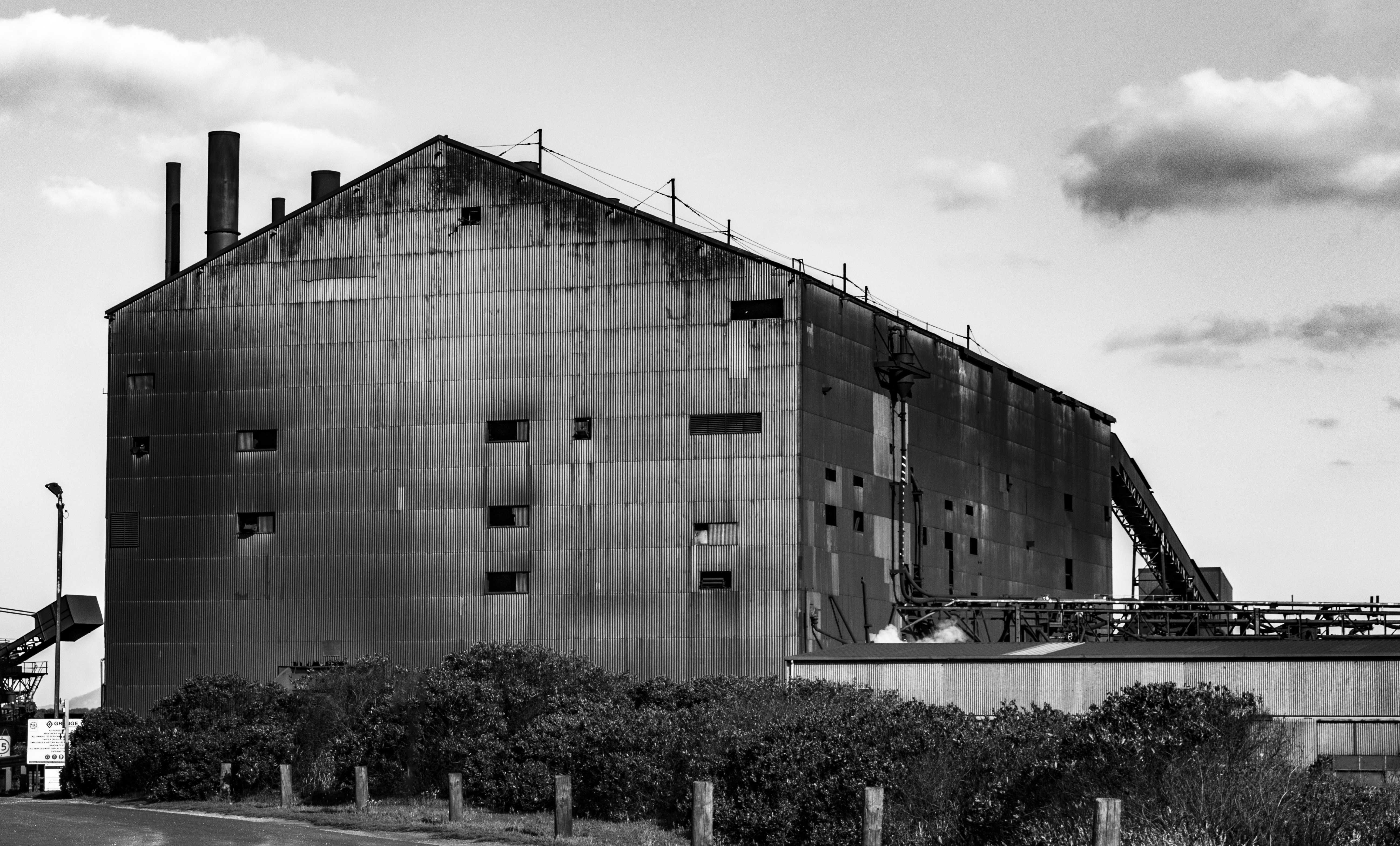 Port Latta, Tasmania.